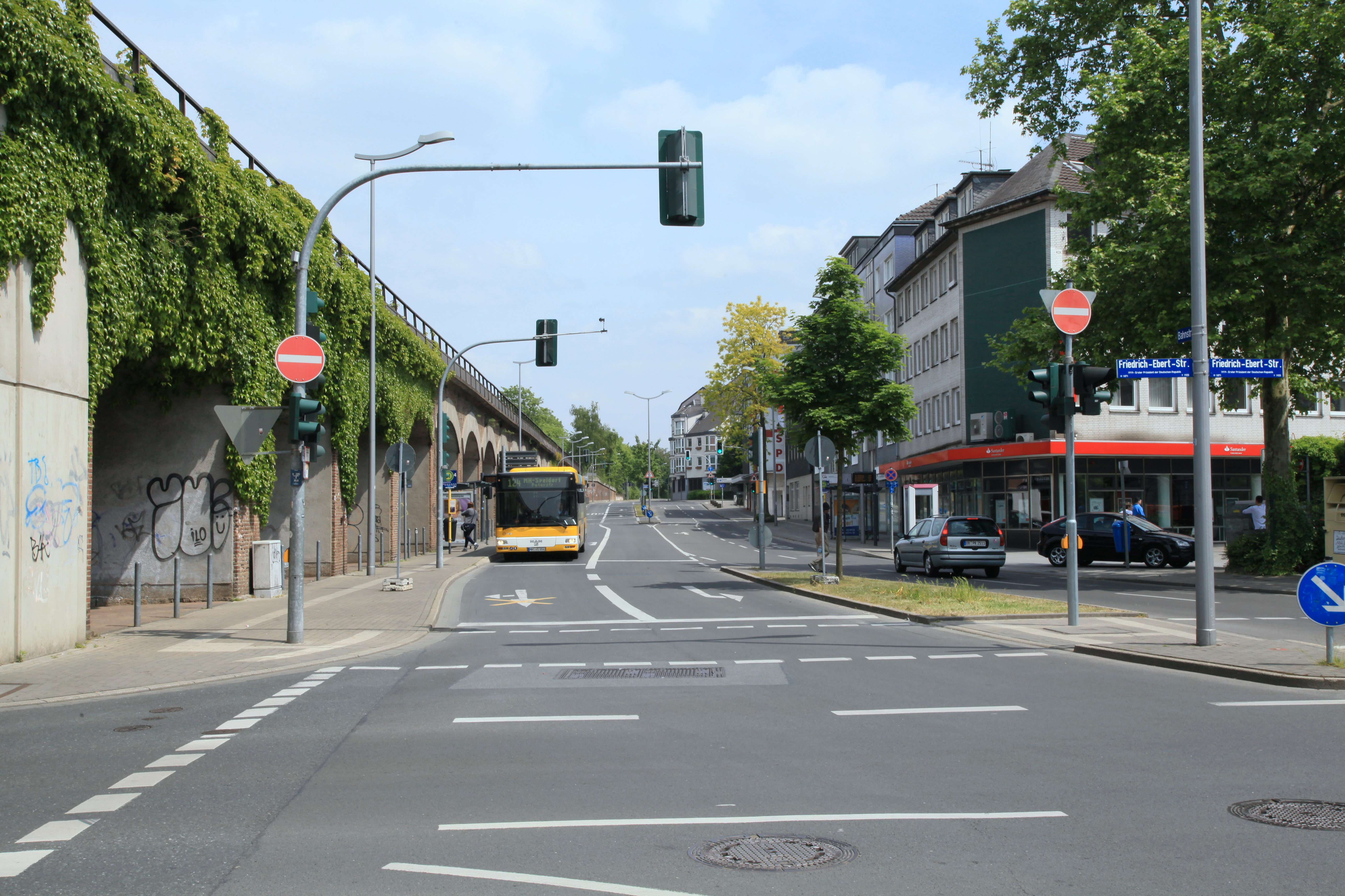 Friedrich-Ebert-Straße, Bahnstraße und Stadt-Viadukt in Mülheim an der Ruhr